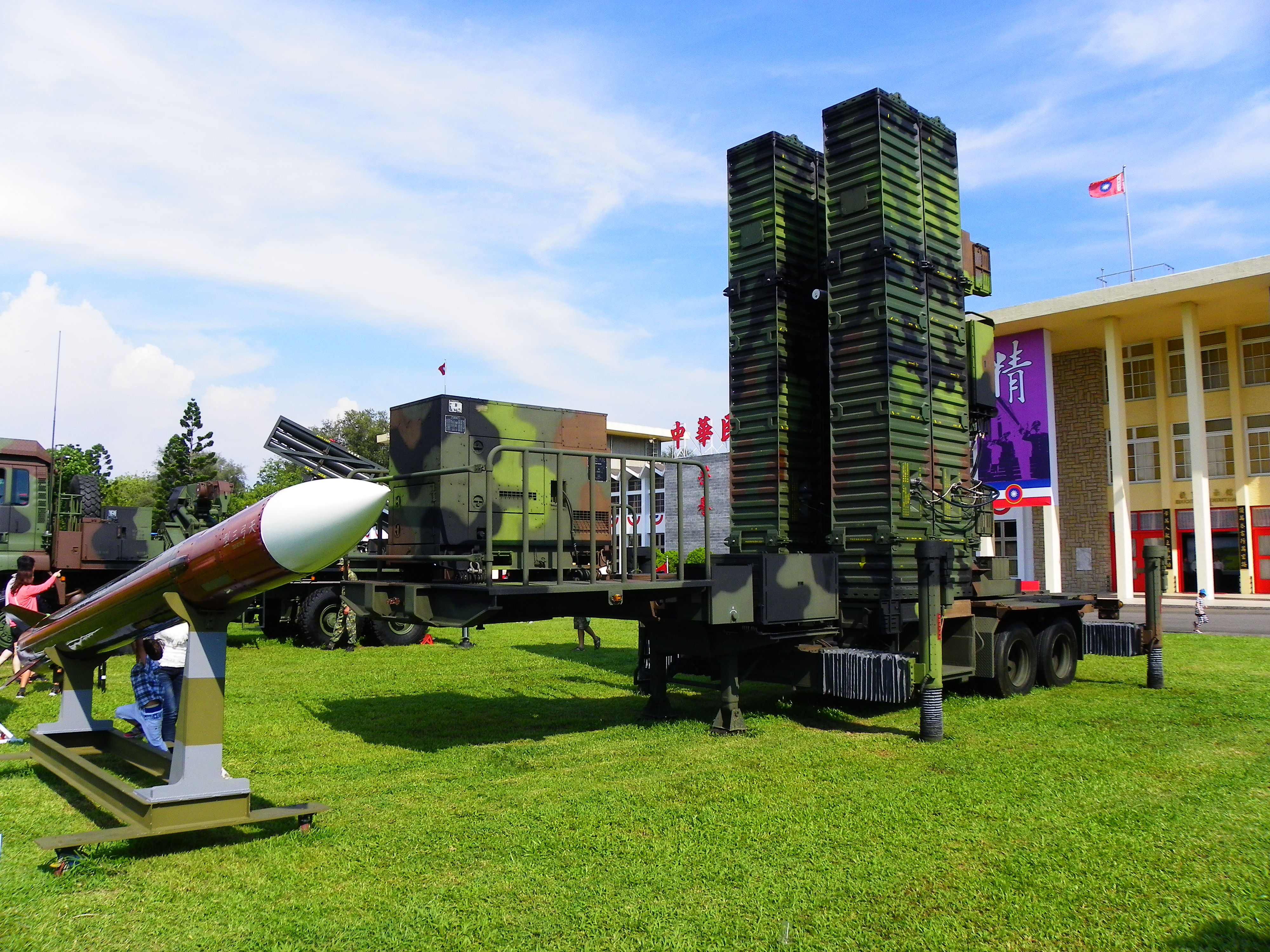 2014年陸軍官校營區開放活動，操場南側展示之天弓三型防空飛彈模型與發射器拖車。